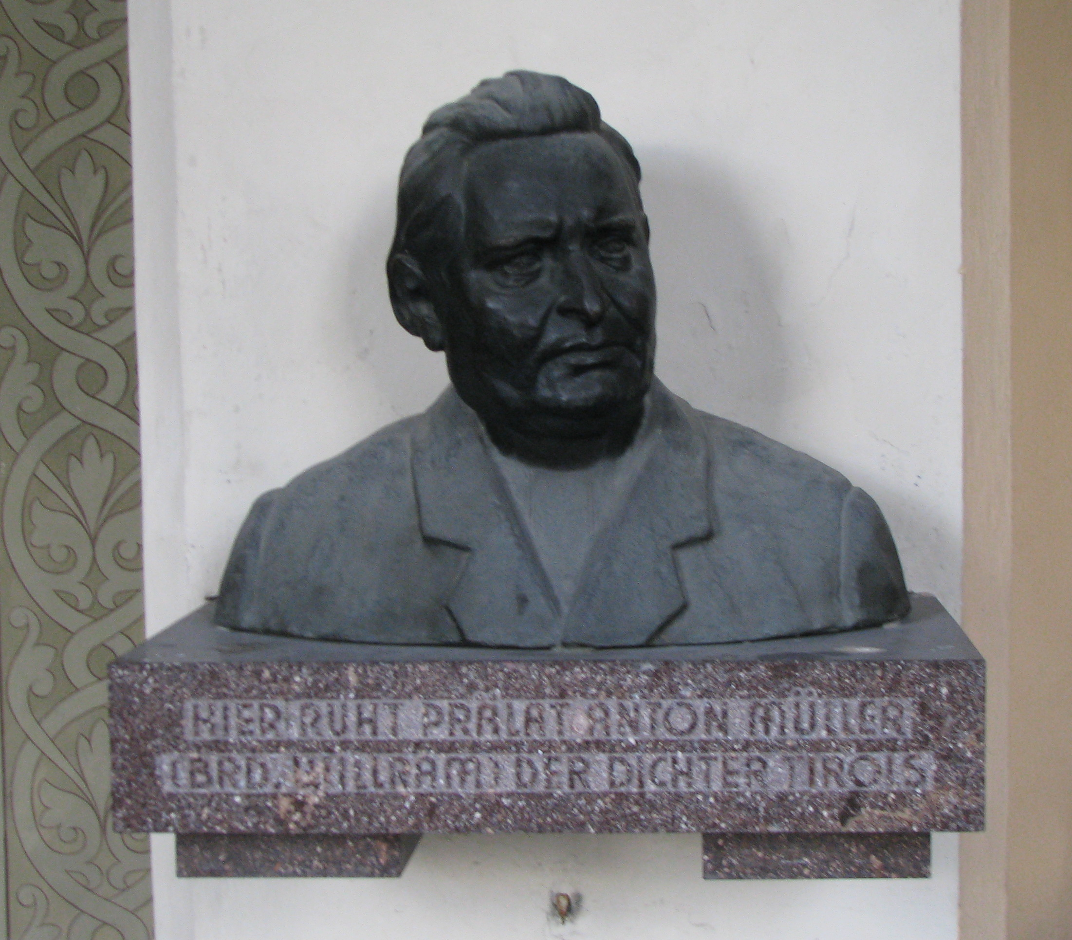 Westfriedhof Innsbruck, Südarkaden des nördlichen Teils: Büste am Grab von Anton Müller (Bruder Willram)